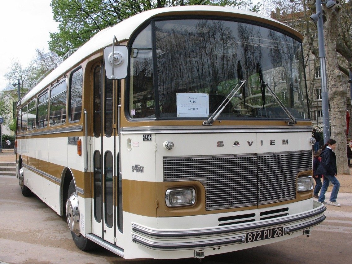 Lancé à l’automne 64, le S45 est une évolution profonde de la série 4000 elle-même commercialisée 15 ans plus tôt, et ayant engendré plusieurs gammes: - R4190 en 1949 - ZR20 en 58 - SC1 en 60 Sa principale innovation est de coucher le moteur sous le plancher, dans l’empattement. D’abord proposé avec un bloc français à essence Fulgur de 150 ch, jugé trop faible par ses utilisateurs, il dispose ensuite de mécaniques diesel MAN jusqu’en 77, année du rachat de la Saviem par Renault. L’ex-Régie ajoute à son catalogue le FR1 en 83, car GT qui connaîtra un grand succès. Le S45, assemblé à Annonay (07), est remodelé une dernière fois en 87 avec la ligne RX, avant de quitter la scène en 93. Son successeur est le Tracer apparu en 91, qui perpétue l'architecture à moteur central... année-modèle: 1972 propriétaire: SRADDA (Sud Rhône-Alpes Déplacements Drôme-Ardèche), ex-Régie Départementale des Autobus de la Drôme puis Régie Voyages Drôme L x l: 10,5 x 2,5 m tare/PTAC: 8,9/14,5t direction: assistance hydraulique pneus: roues AR non jumelées type moteur: MAN D0846 HM cylindrée: 7 258 cm3 puissance maxi: 125 kW transmission: boîte manuelle R107 6 rapports V. max: 80 km/h